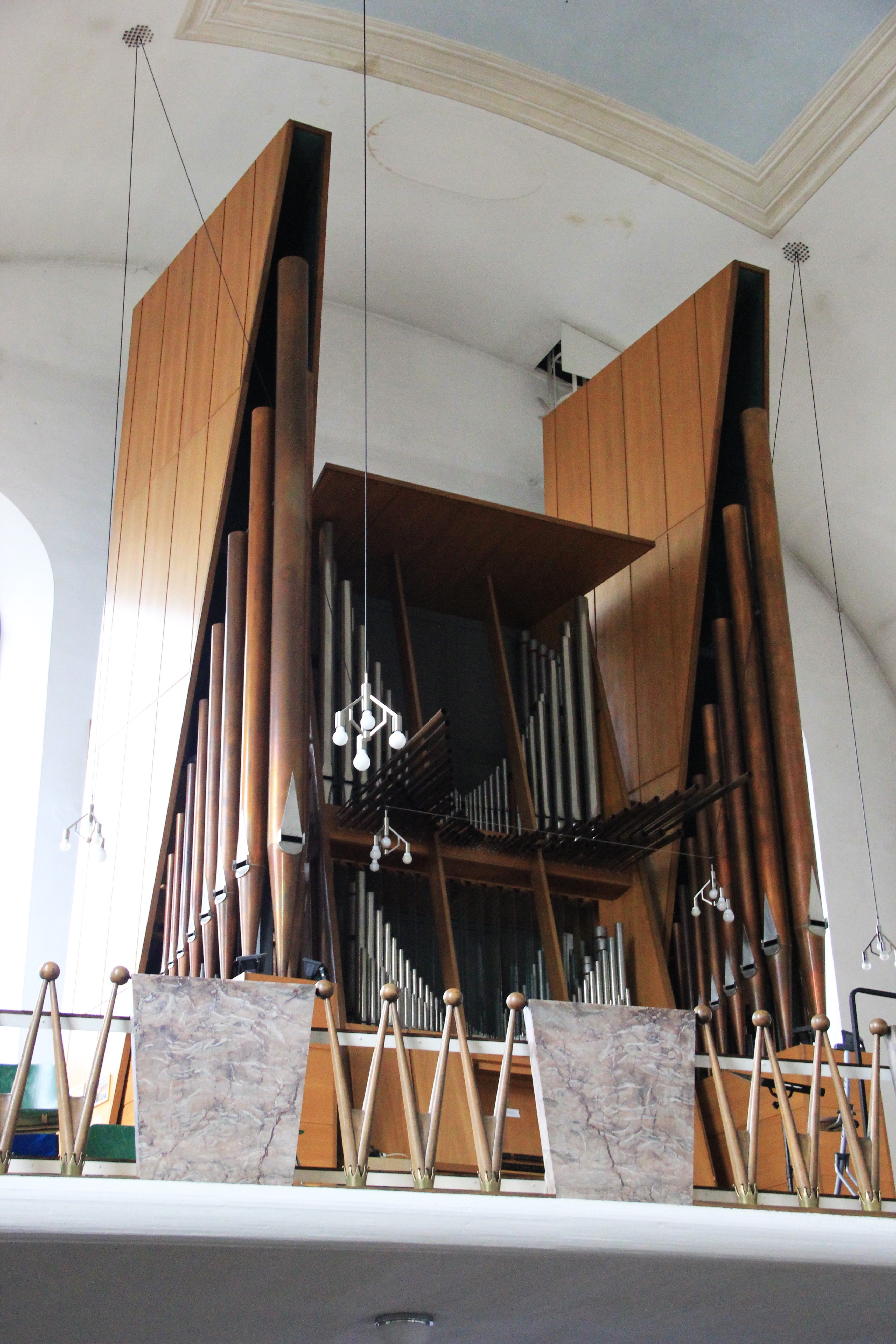 Die Kirche Sankt Adelheid am Pützchen, Karmeliterstraße; Rieger-Orgel.